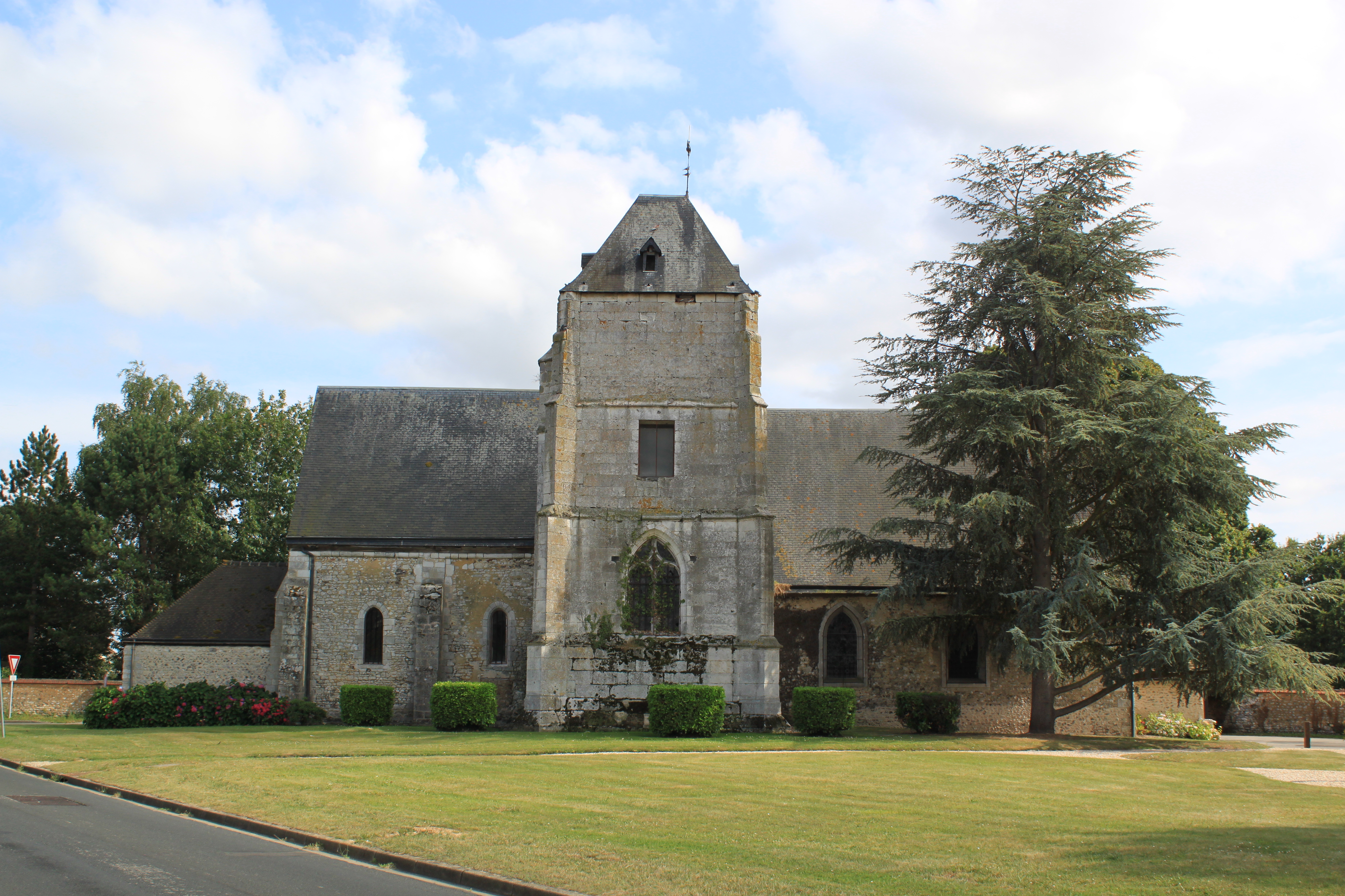 Église Saint-Germain (XVI° siècle)